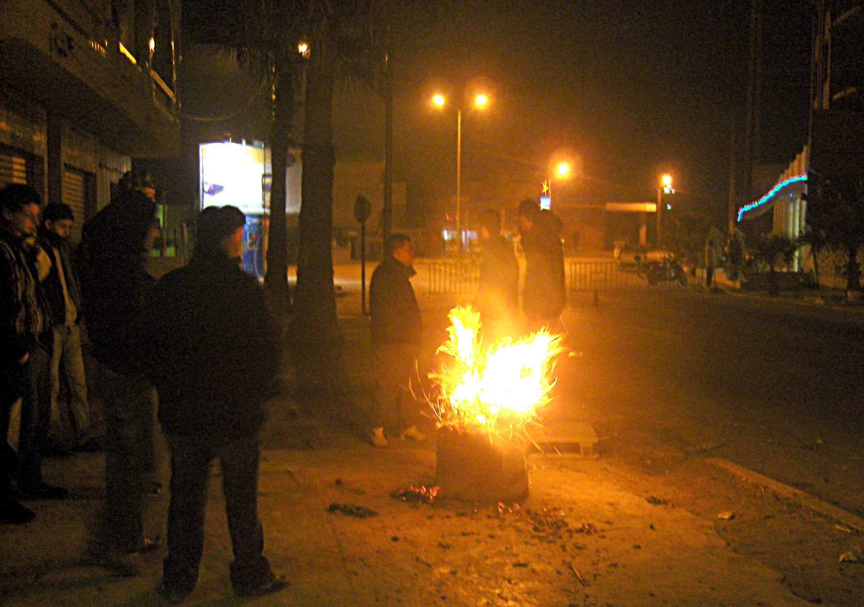 Barrage routier mis en place par le Comité vigile pendant la nuit du quartier en l'absence des forces de l'ordre, Sayada, Tunisie.